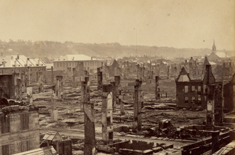 La photo représente le quartier Saint-Roch après le grand incendie de Québec le 14 octobre 1866.